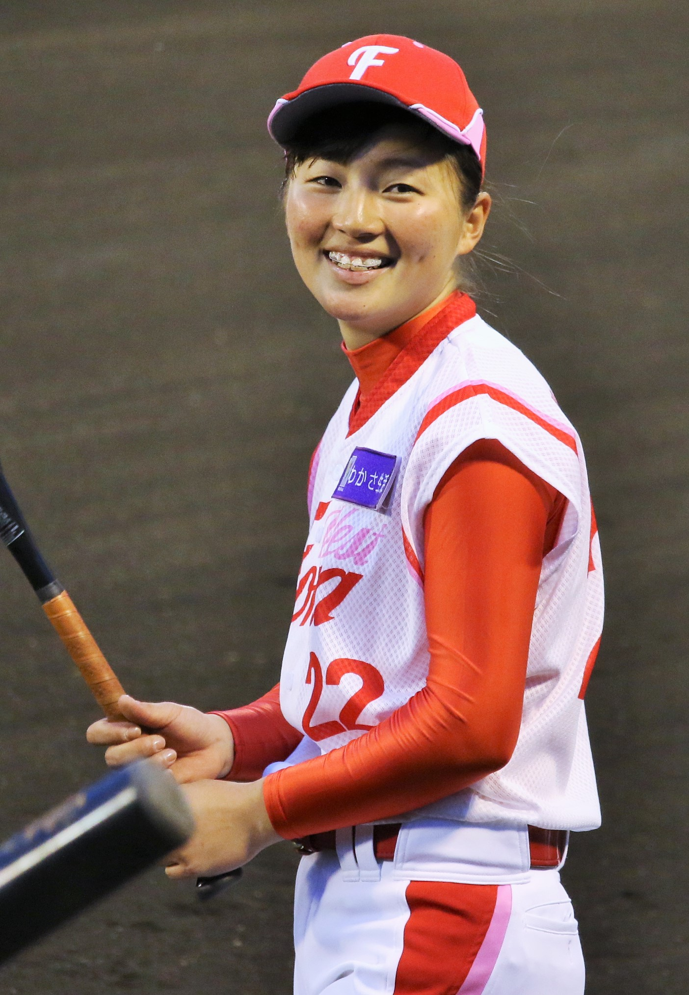 ウエスト・フローラ外野手の金山亜莉紗。わかさスタジアム京都にて。